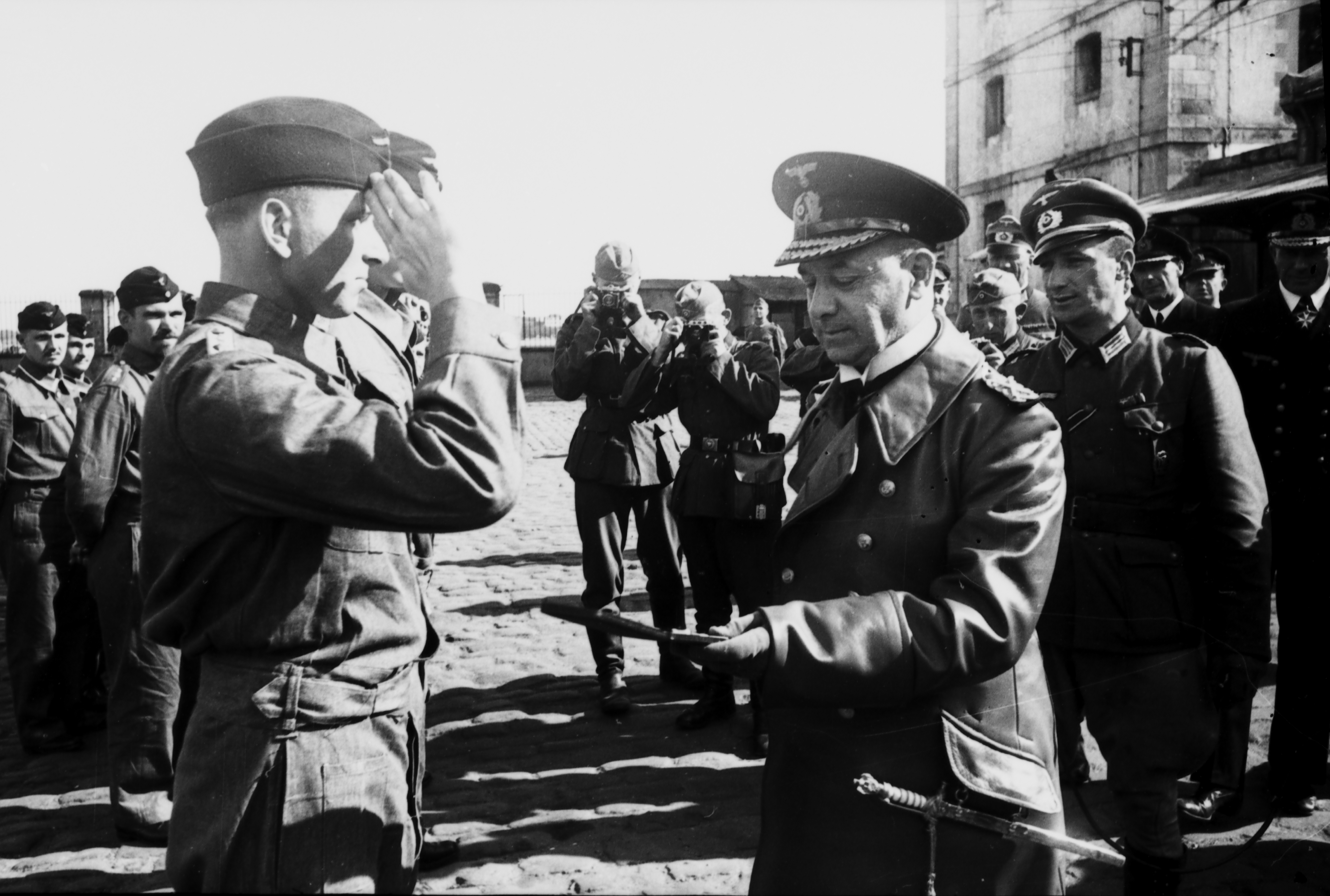 Findbuch